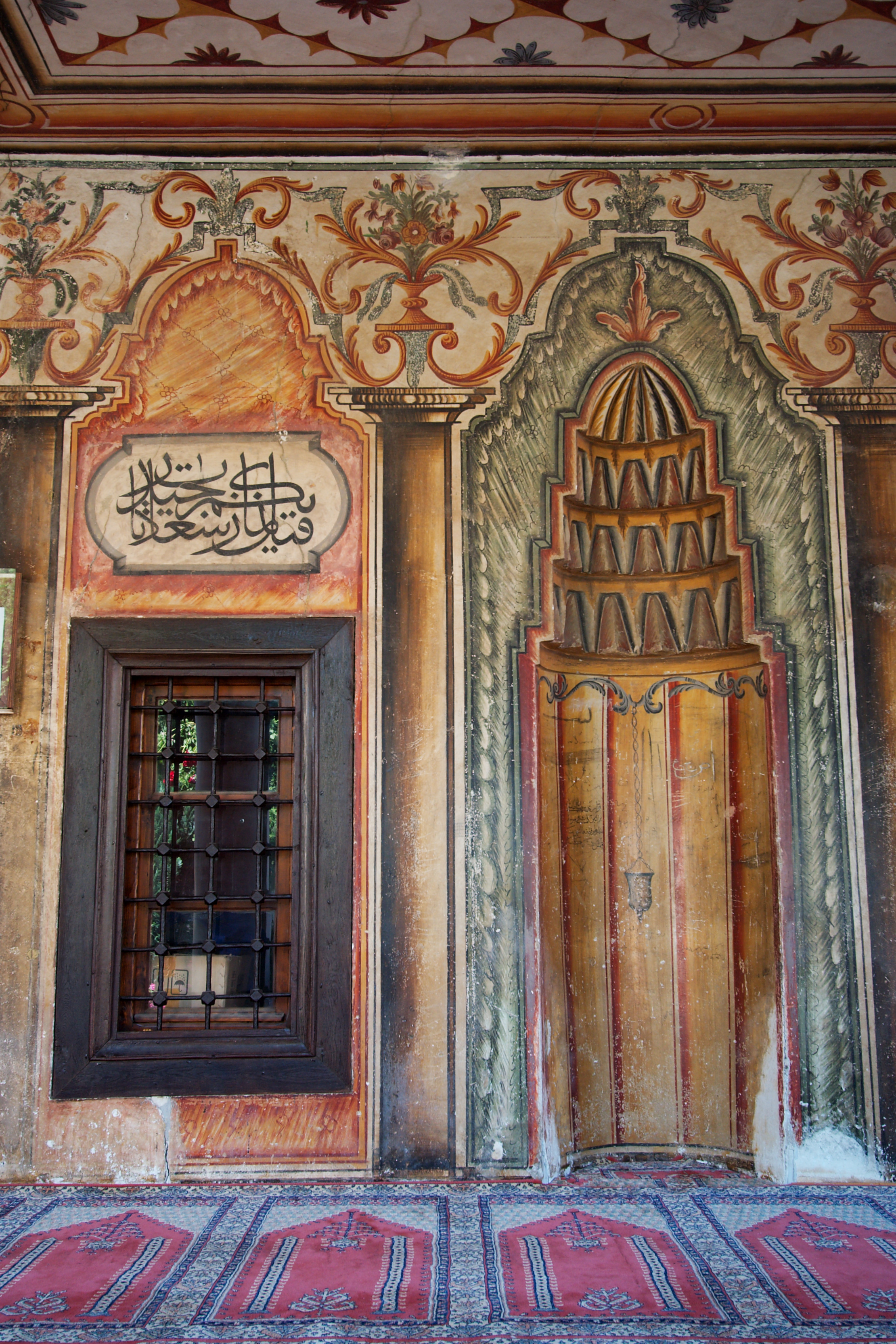 Mirhab der Bunten Moschee in Tetovo, Mazedonien